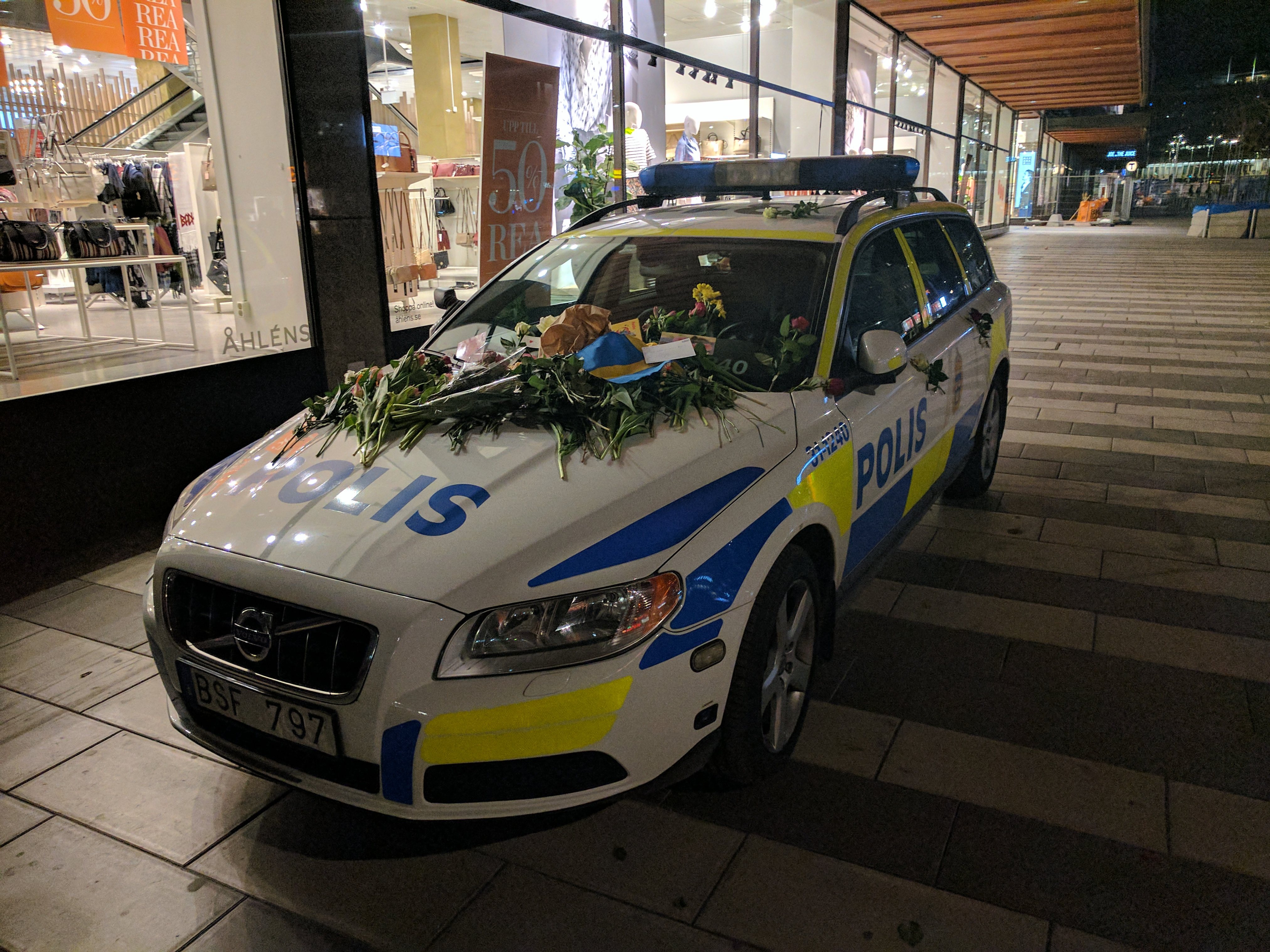 2017 Stockholm attack - 2017-04-08